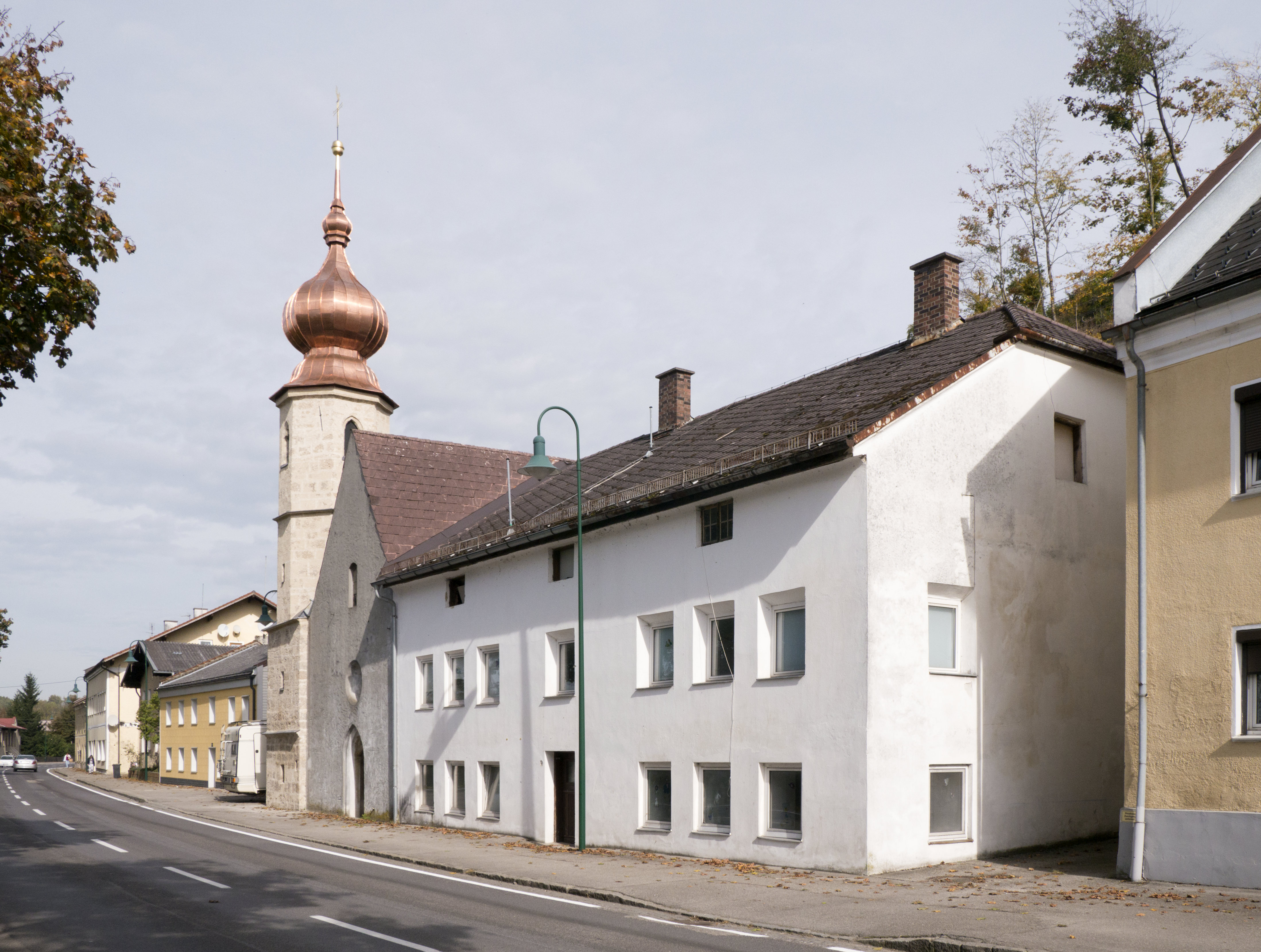 Wohnhaus, ehem. Spitalsgebäude